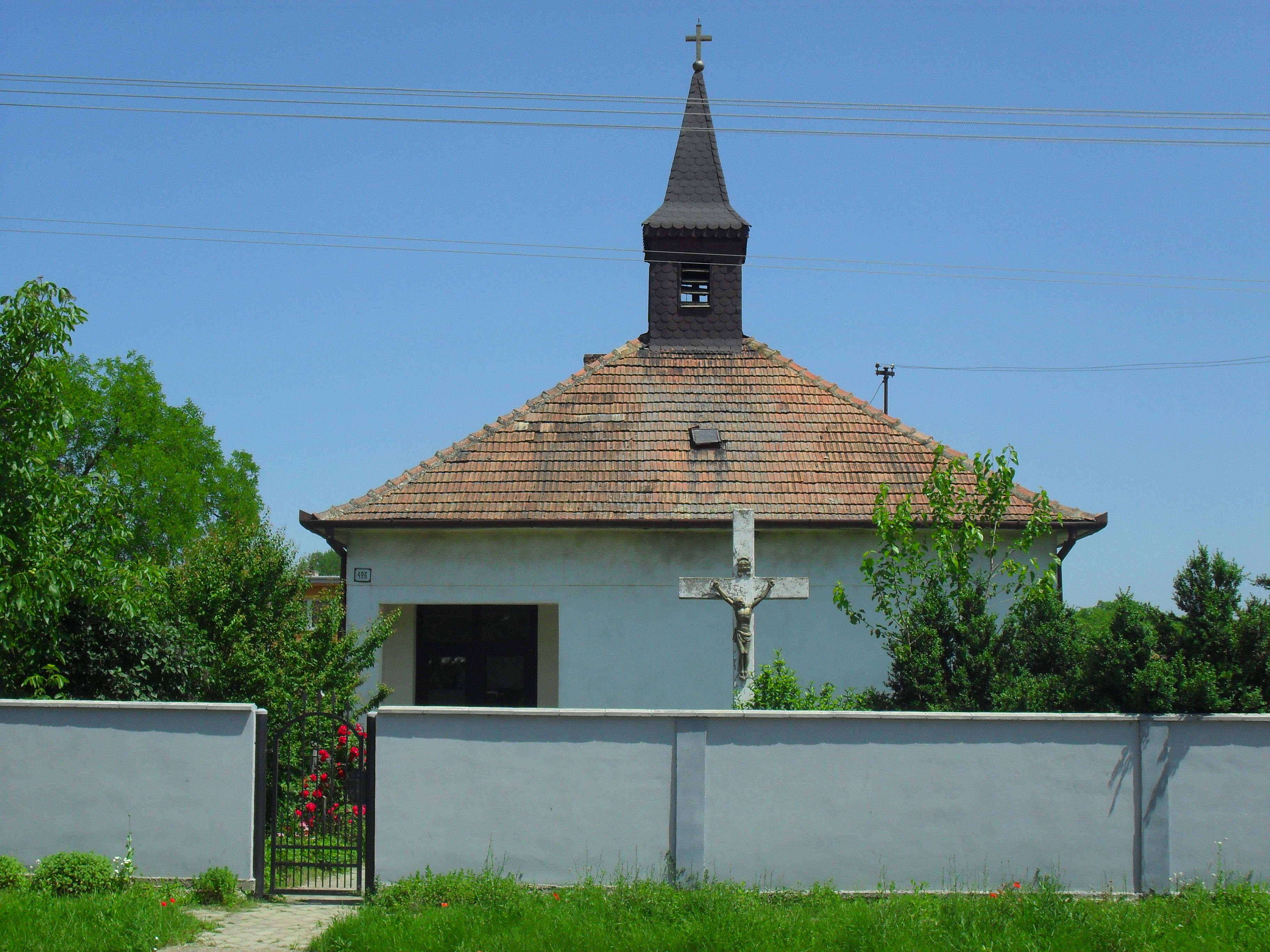 Madar - katolikus templom